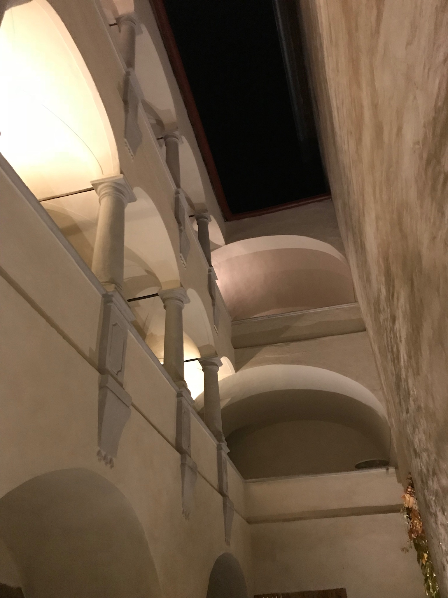 Arkadenhof des aus dem 16. Jahrhundert stammenden Holzingerhauses in Stein